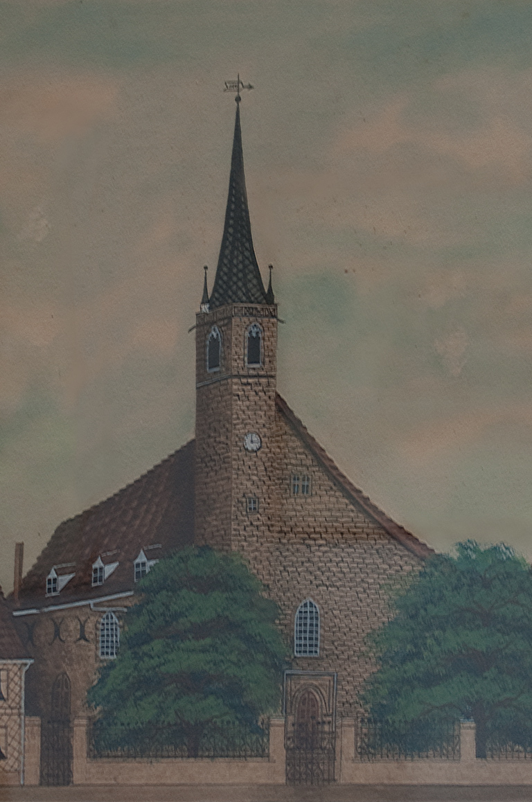 Ausschnitt der Zeichnung mit dem Titel "Alte St. Thomaskirche i. Erfurt v.d. Abbruch i. Jahre 1902"